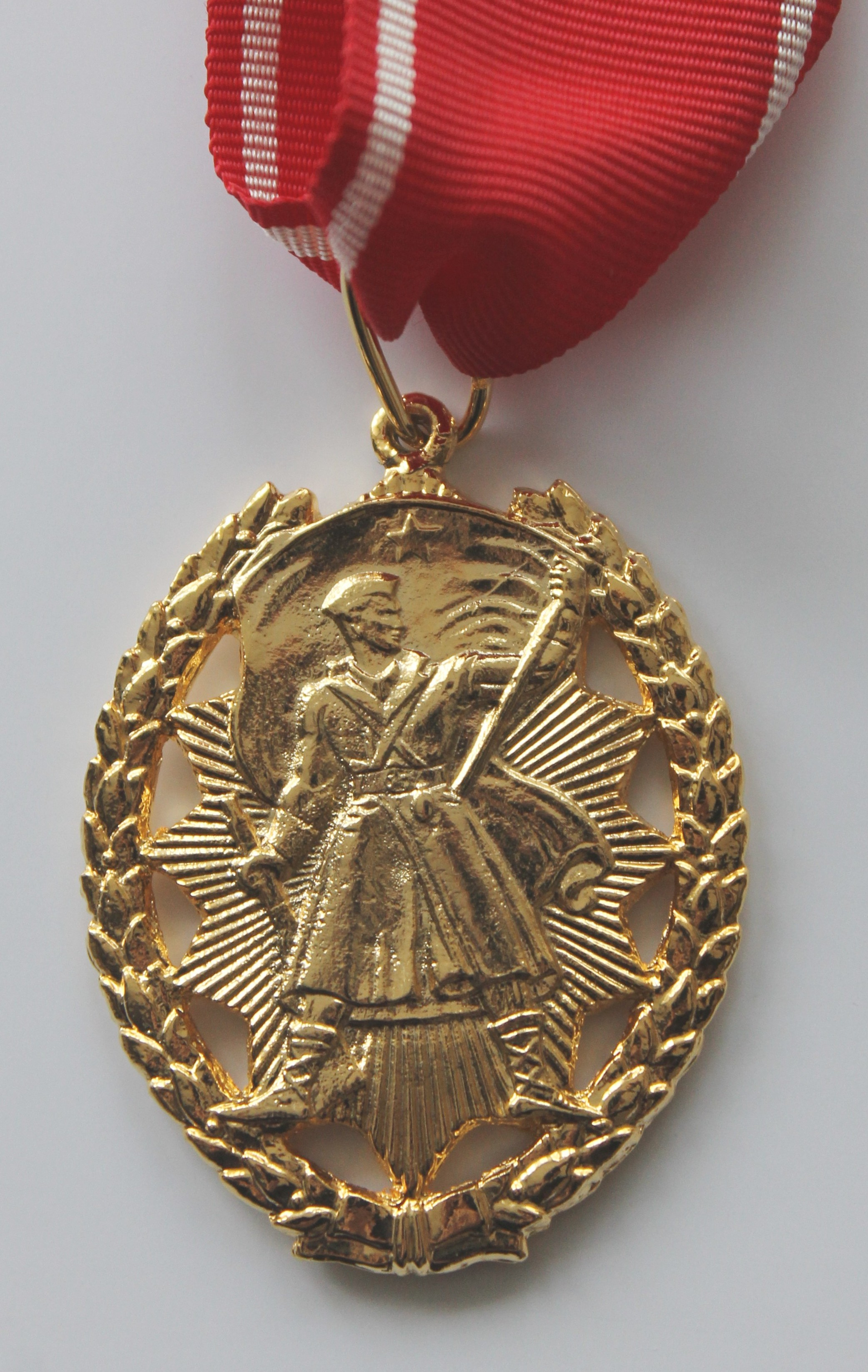 Orden narodnog heroja Jugoslavije